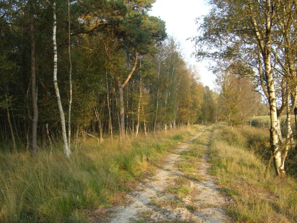 Naturschutzgebiet „Großes und Weißes Moor“